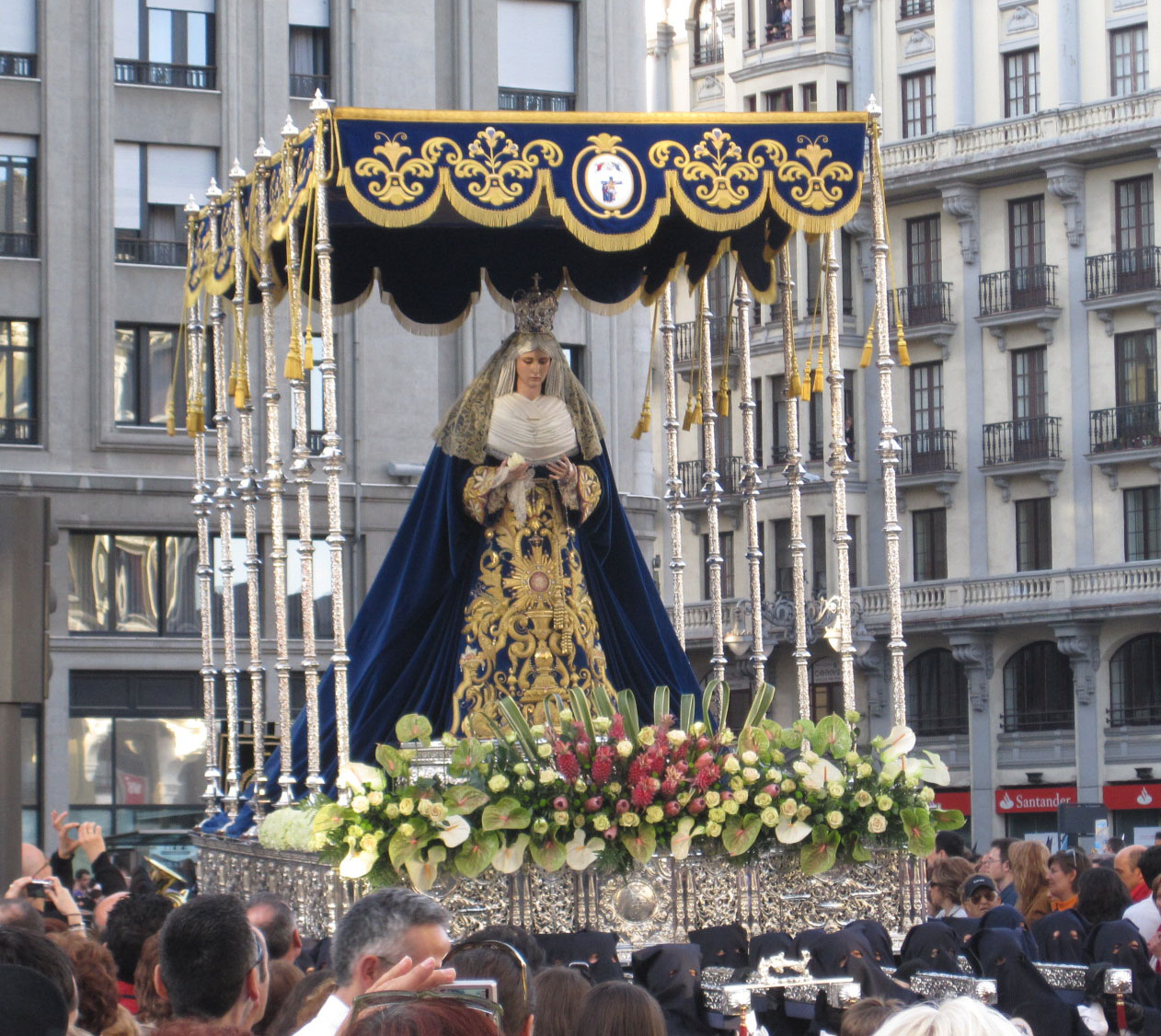 Paso de Nuestra Señora la Virgen de la Esperanza. Sacramental y Penitencial Cofradía de Nuestro Padre Jesús Sacramentado y María Santísima de La Piedad, Amparo de los Leoneses. León, España.